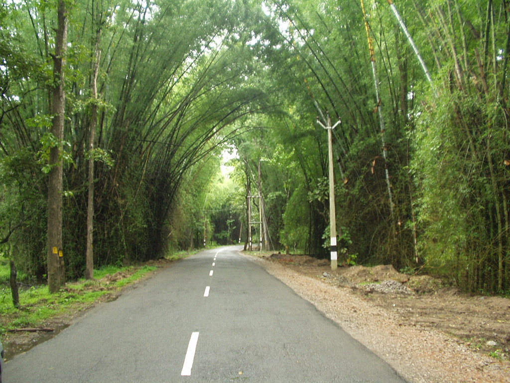 Enroute - Wayanad, Kerala